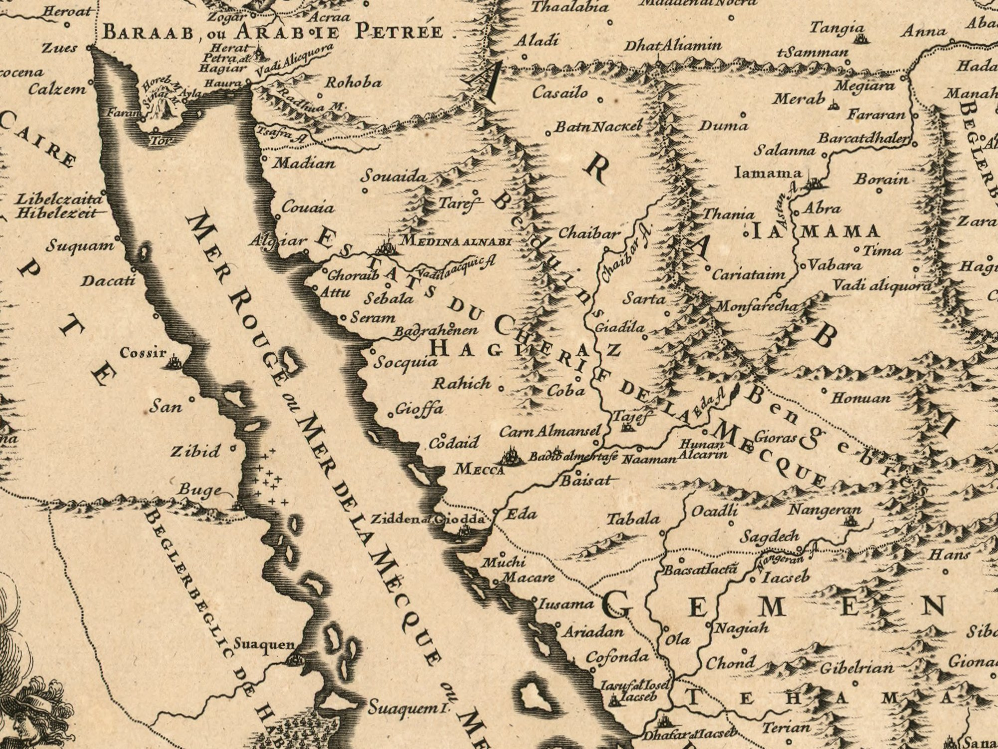 Estats de l'Empire du Grand Seigneur des Turcs, en Europe, en Asie, et en Afrique, divisé en touts ses Beglerbeglicz, ou Gouvernements ; ou [sic] sont aussi remarqués les Estats qui luy sont Tributaires / dressé sur les plus Nouvelles Relations par le S[ieu]r Sanson, Géographe ordinaire du Roy ; dédié au Roy par so tre-humble, tres-obéissant, et tres fidele Serviteur Hubert Iaillot